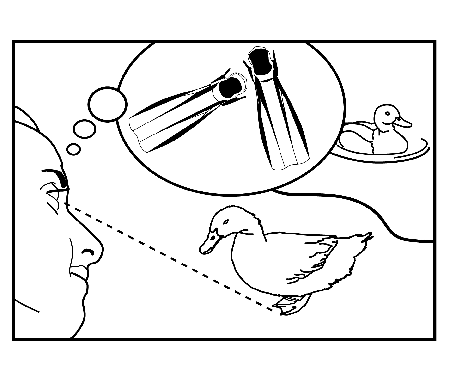 metodologia de la biònica